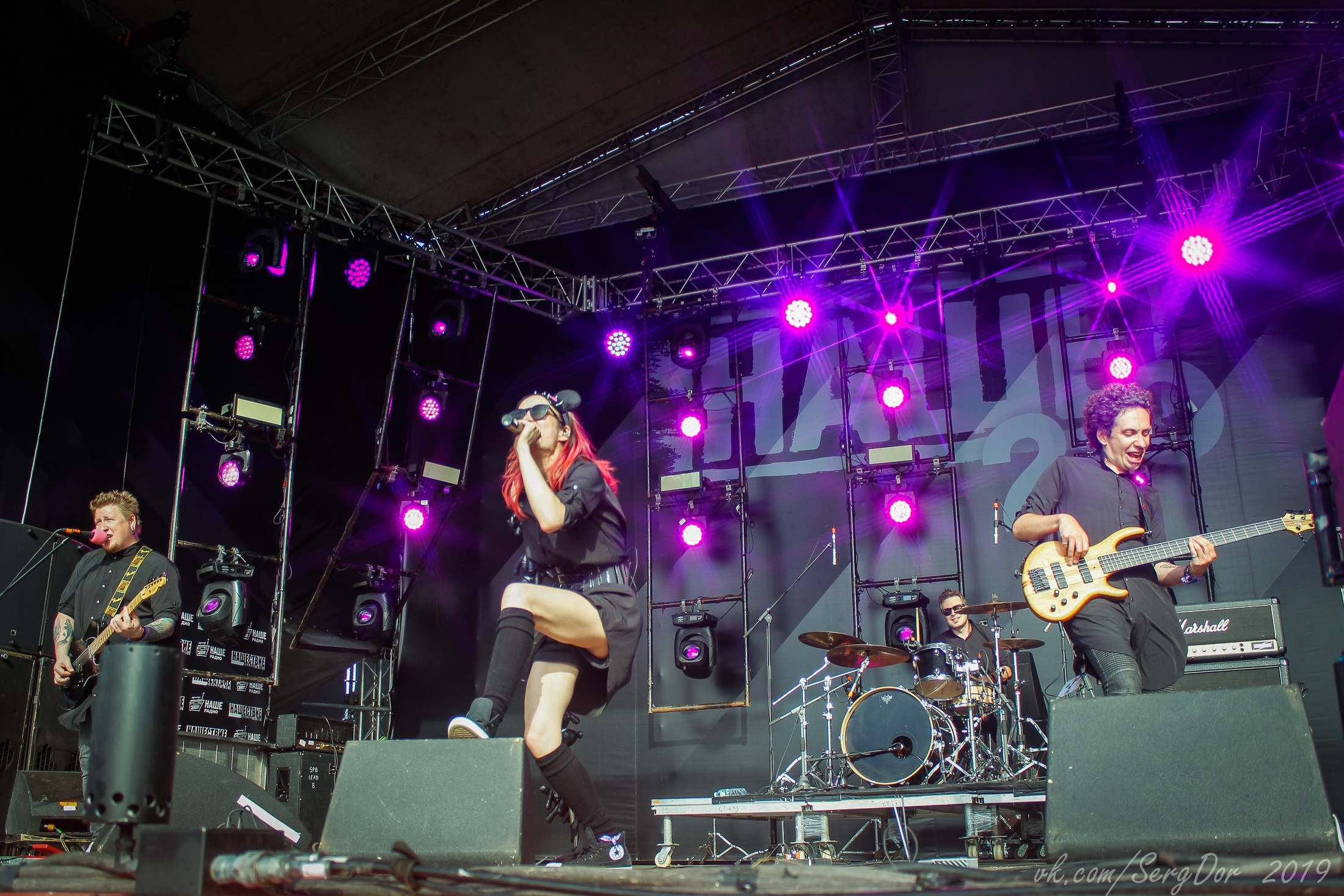 Дайте Два на Нашествии-2019